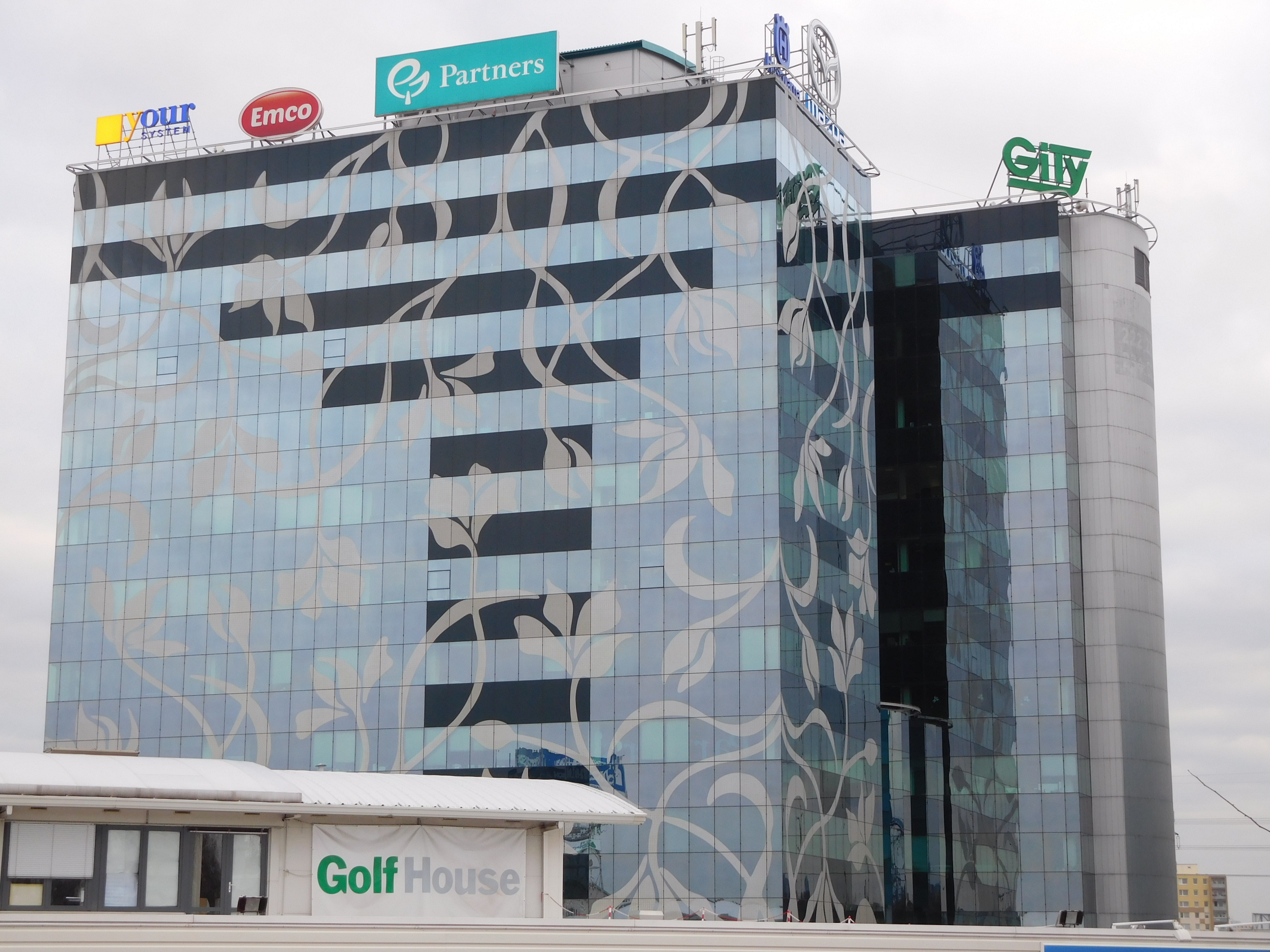 Praha - Chodov, Türkova 5b - Prague Gate